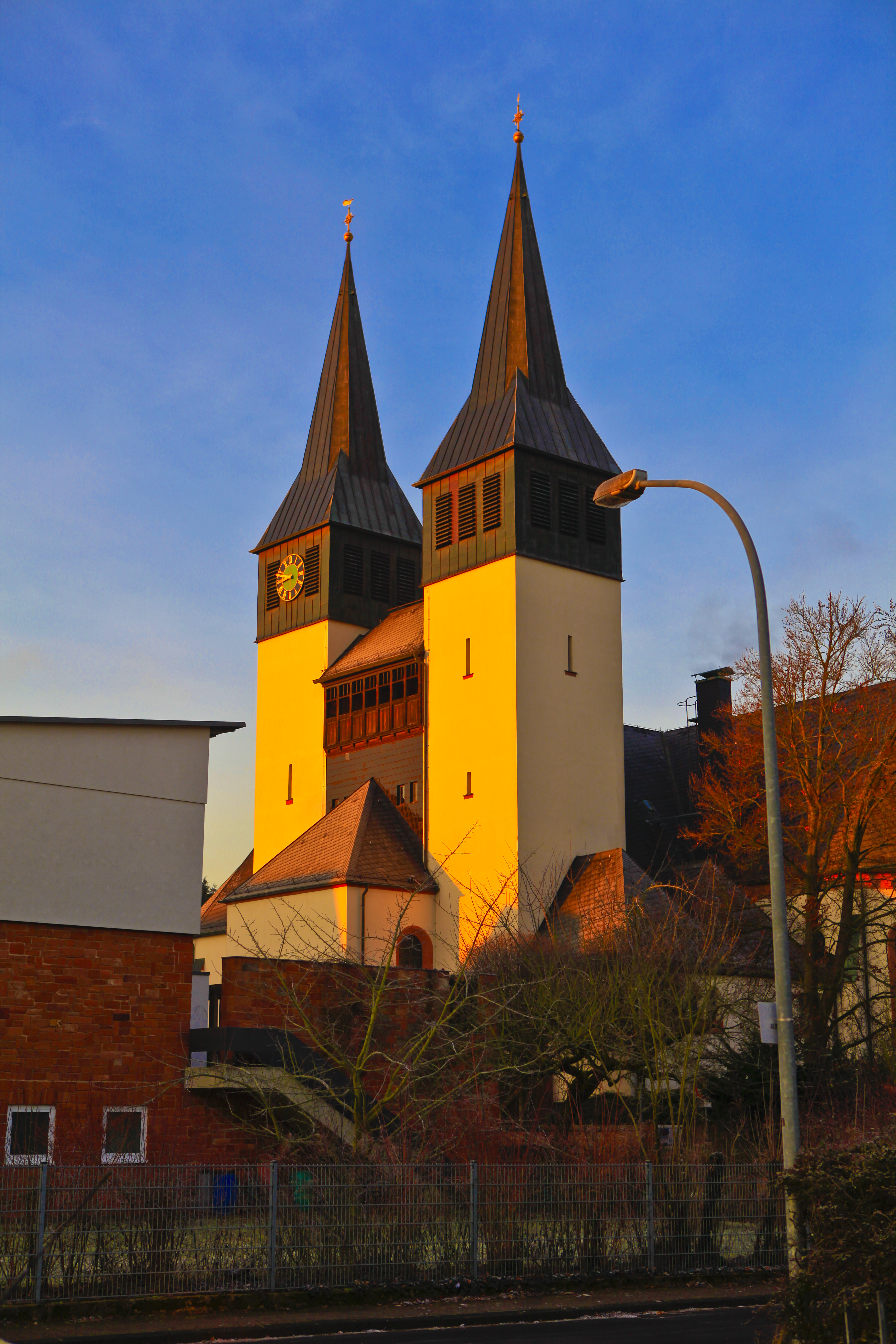 Morgensonne strahlt die Kirche an (Südseite)